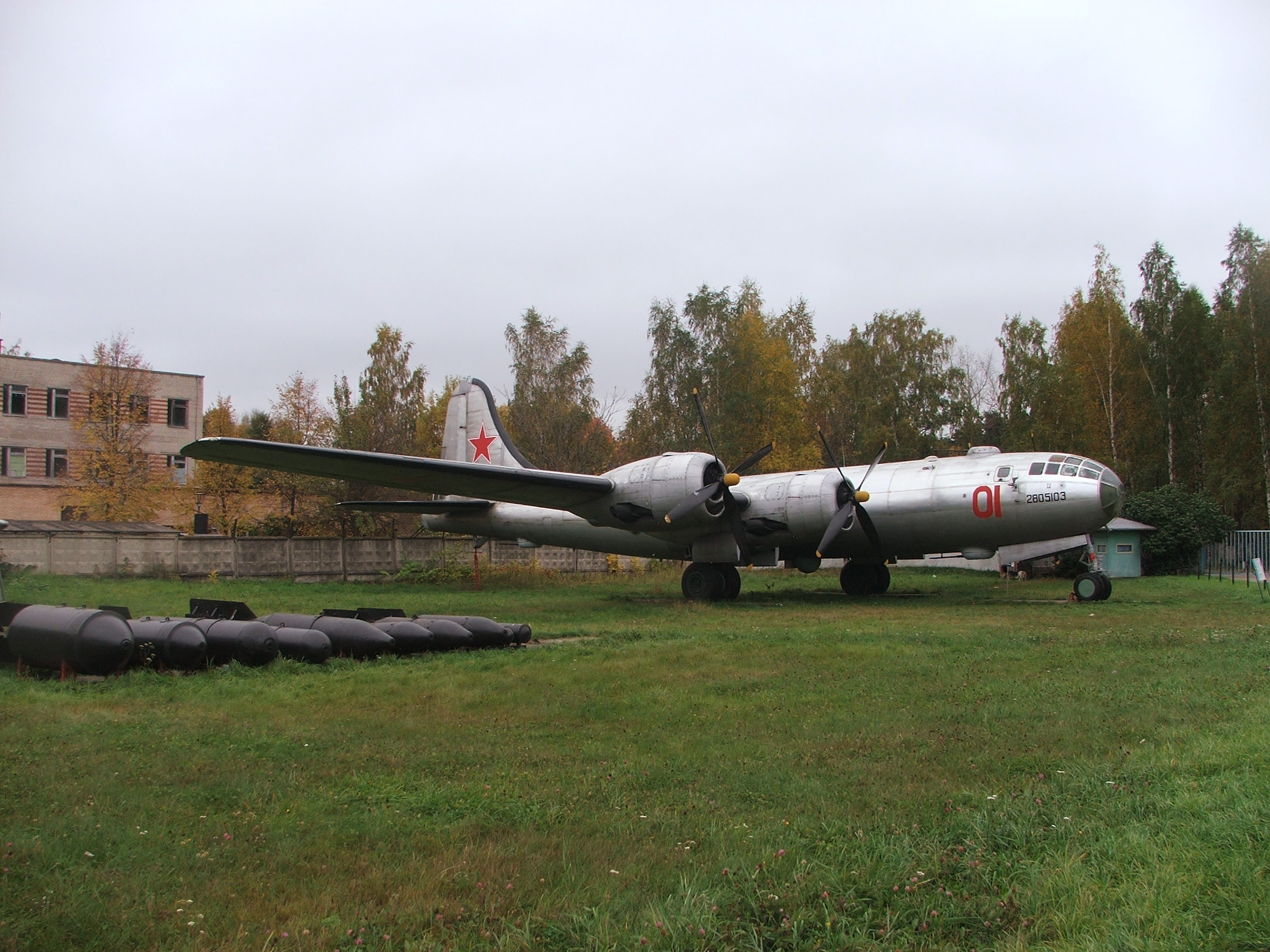 Tupolev Tu-4 at Monino